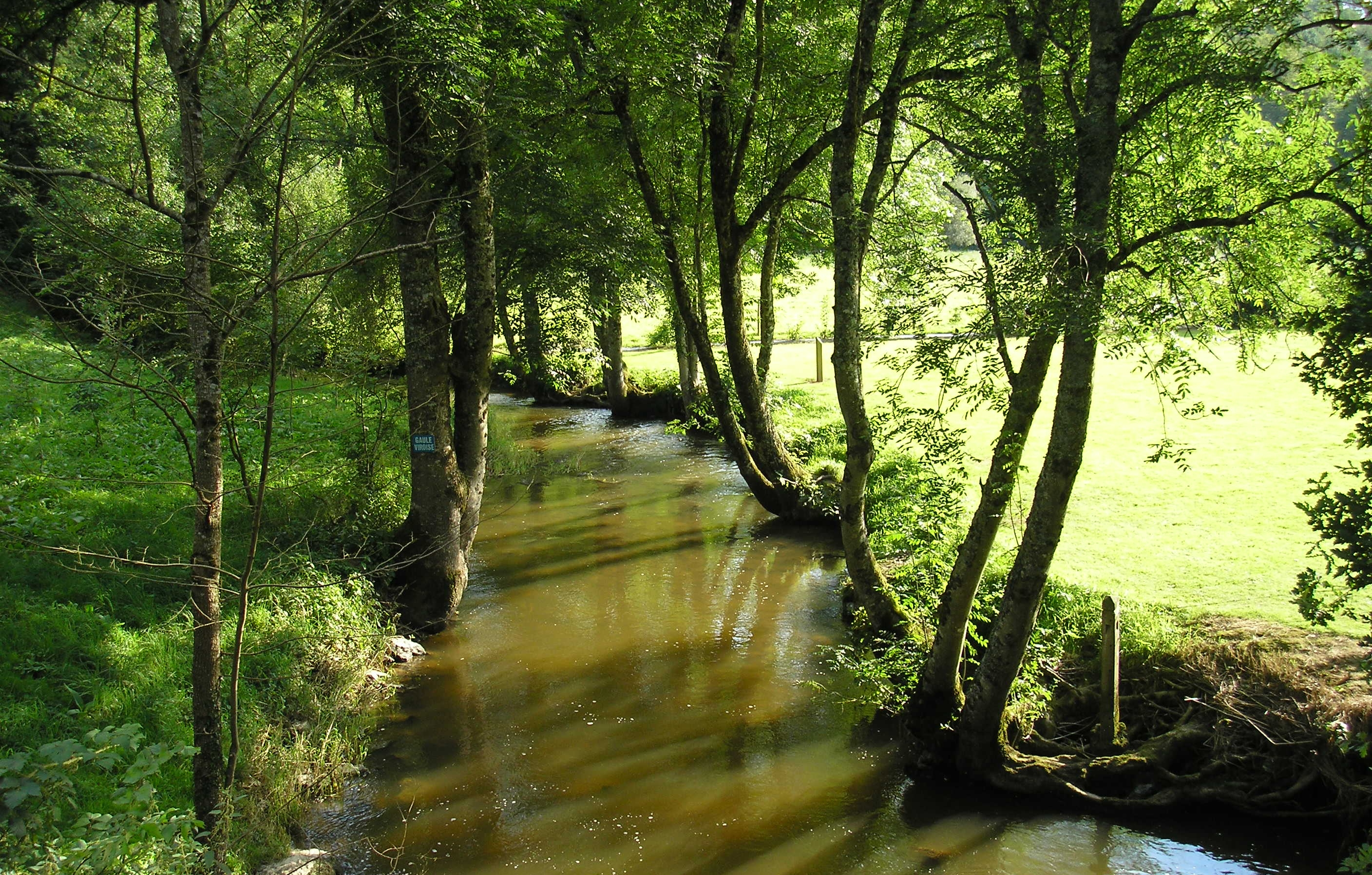 Le Tourneur (Normandie, France). La Souleuvre.